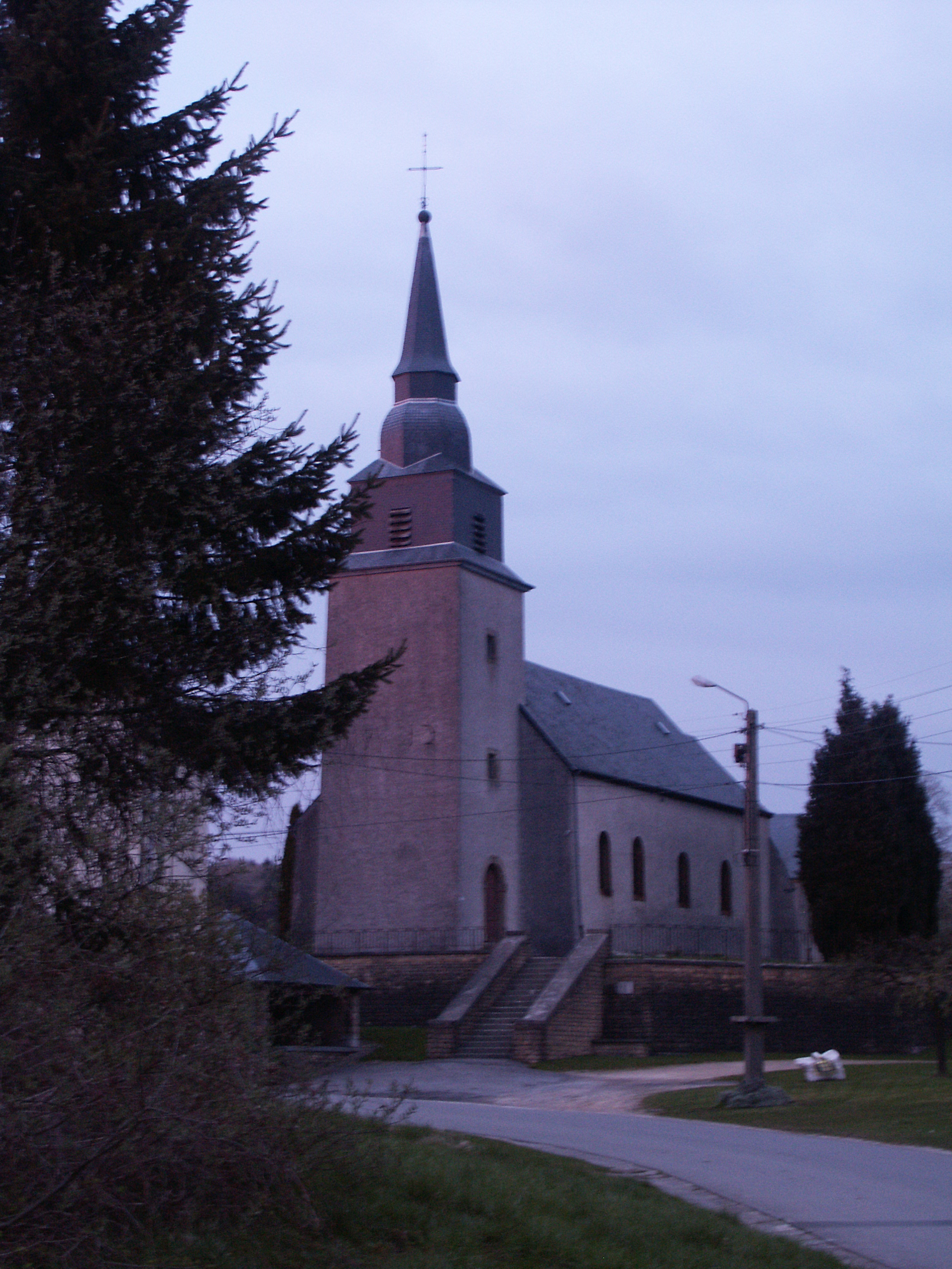 L'église Saint-Martin de Villers-sur-Semois